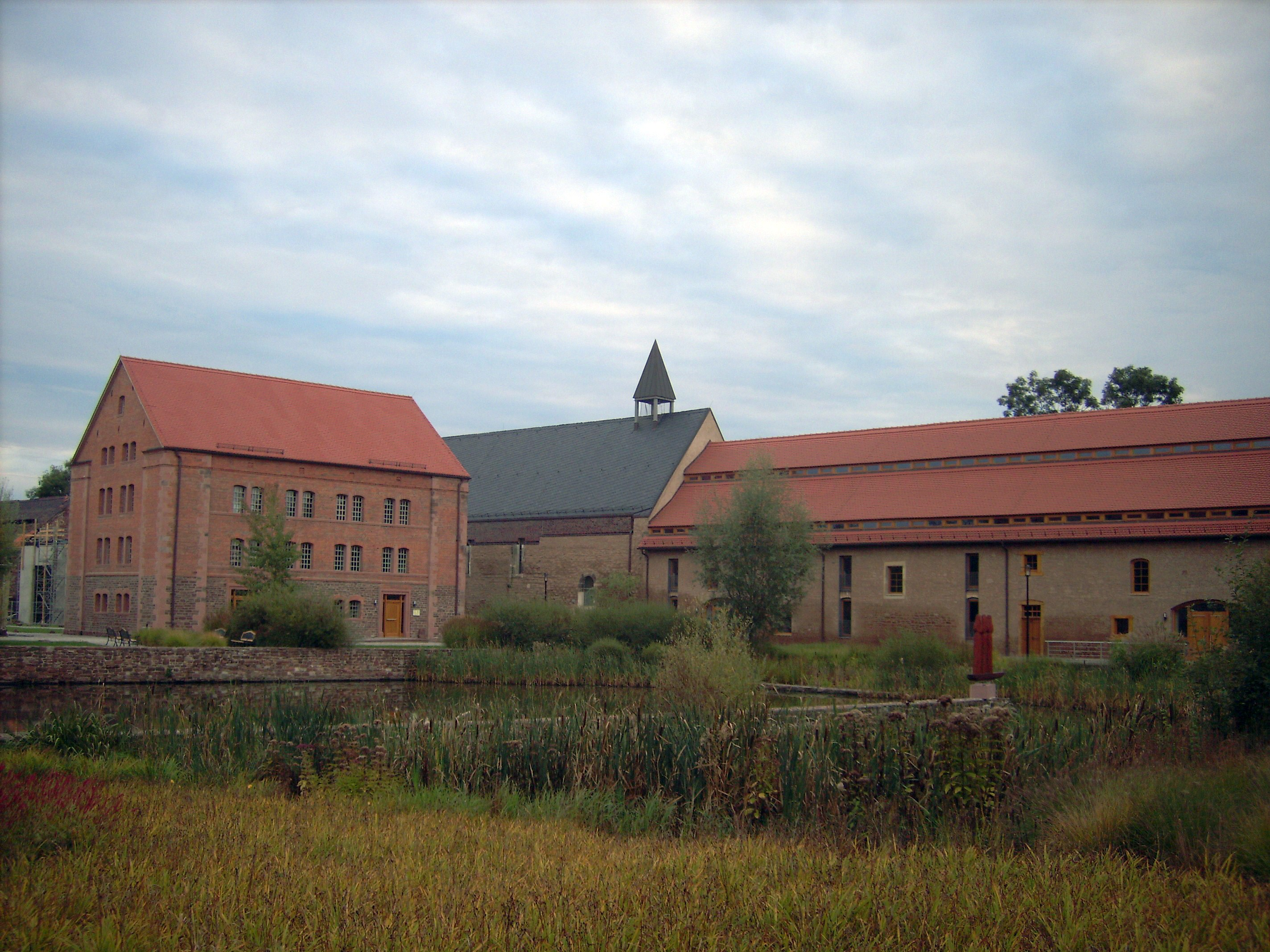 Kloster St. Marien zu Helfta, Liboriushaus, Klosterkirche und Konventsgebäude